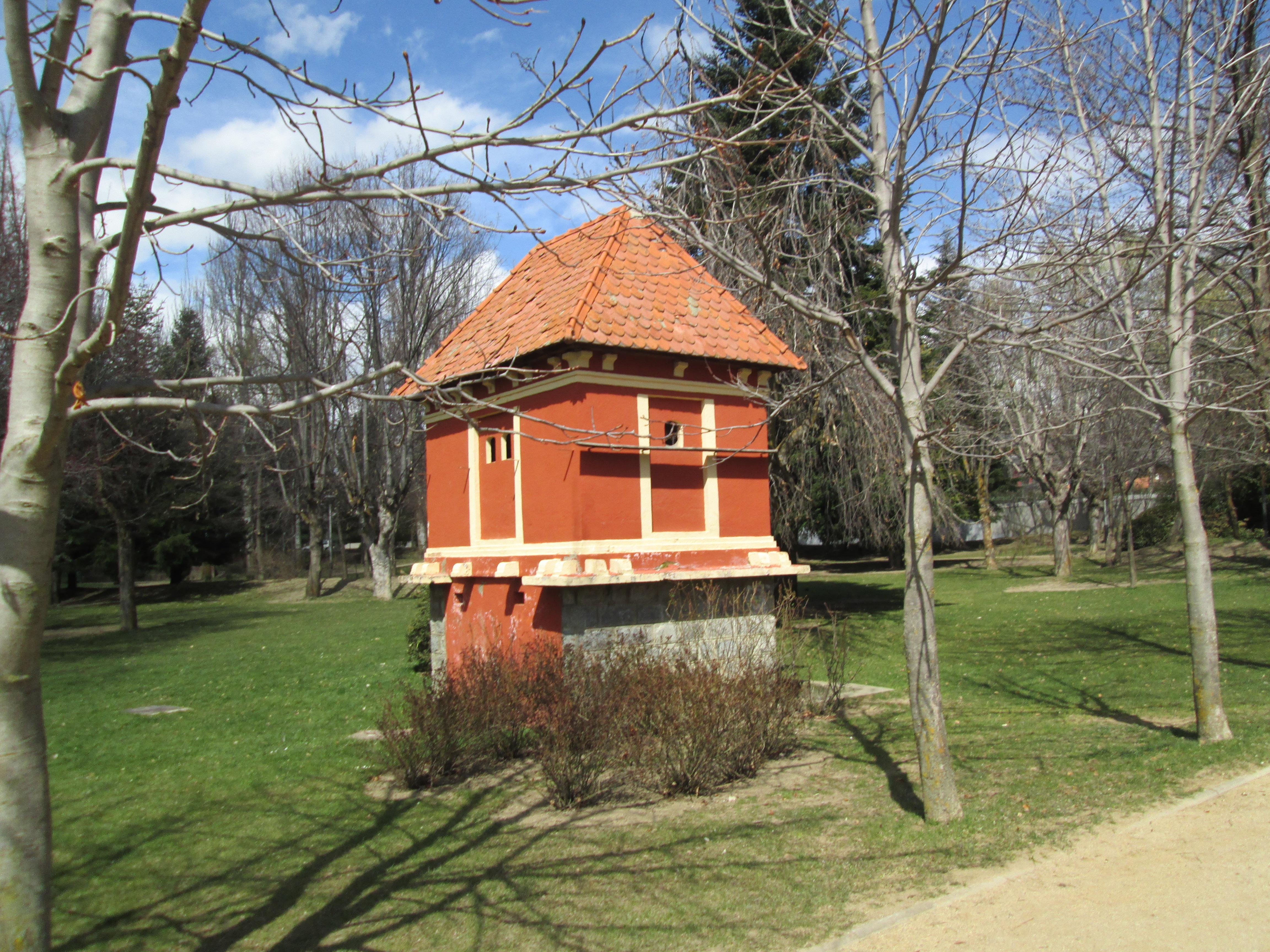 llac març 2014